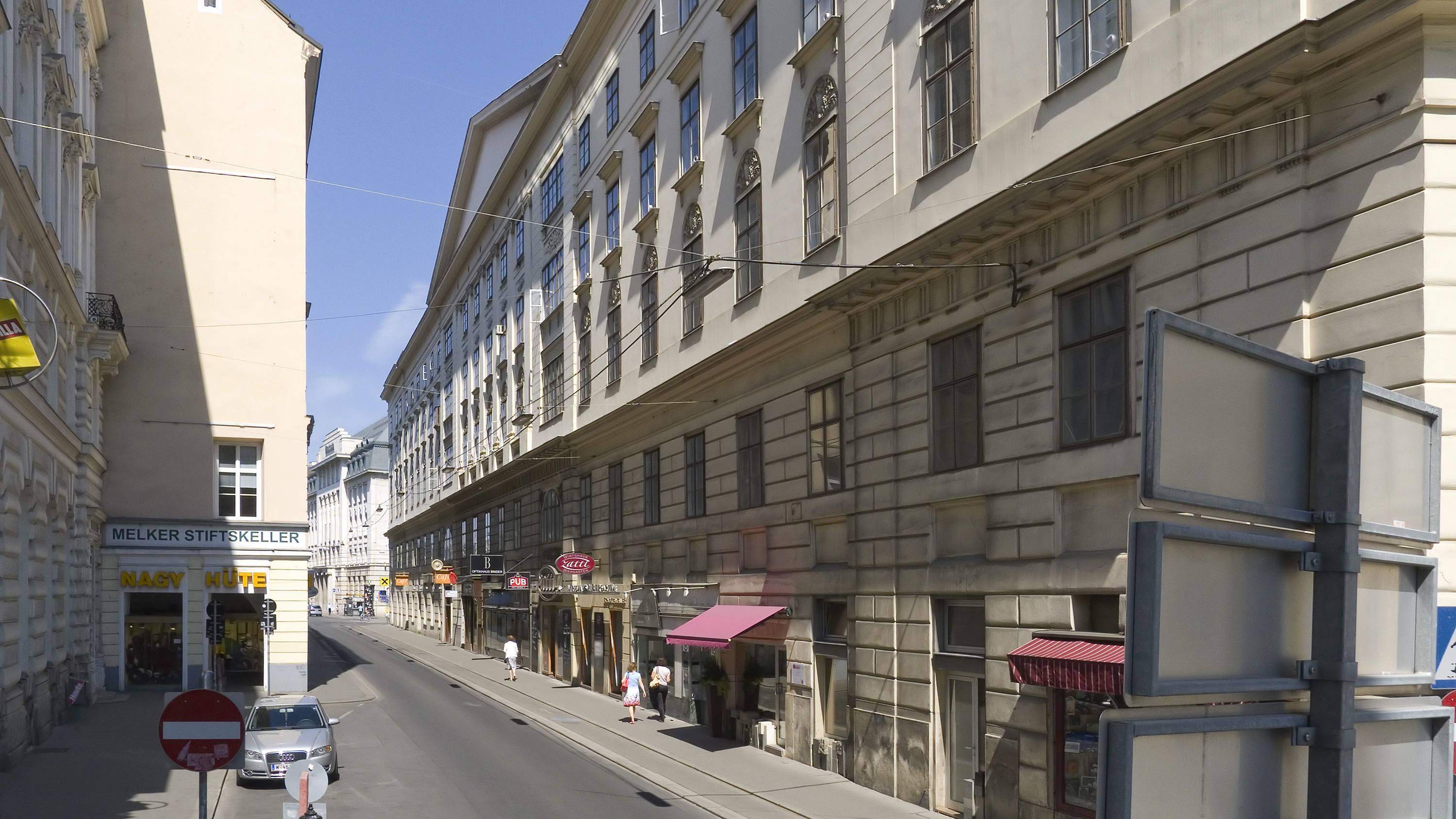 Schottengasse in Wien 1 bei Nr. 1 Richtung Nordwesten